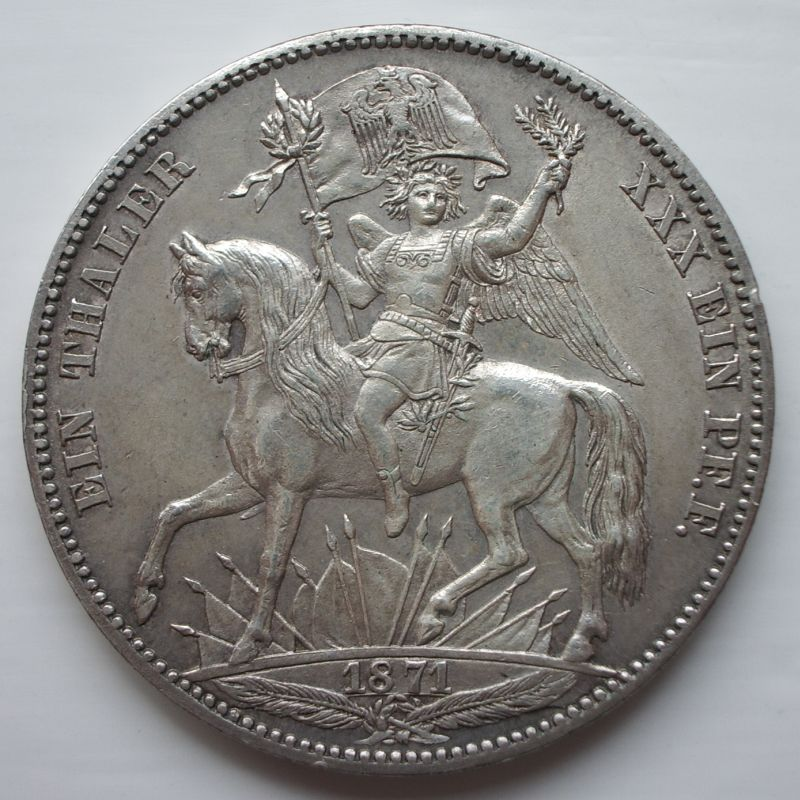 Vereinstaler, geprägt 1871 in Sachsen als Gedenkmünze Der Münzfuß wurde auf die Münze geprägt: XXX EIN PF.F. - 30 Taler ein Pfund Fein(Silber)